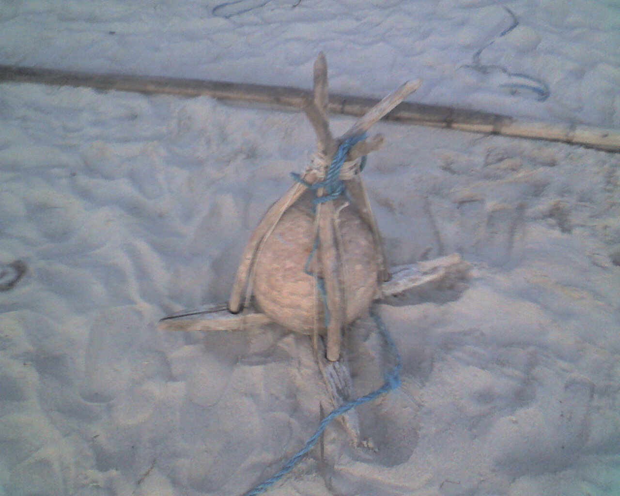 Ancora de uma jangada